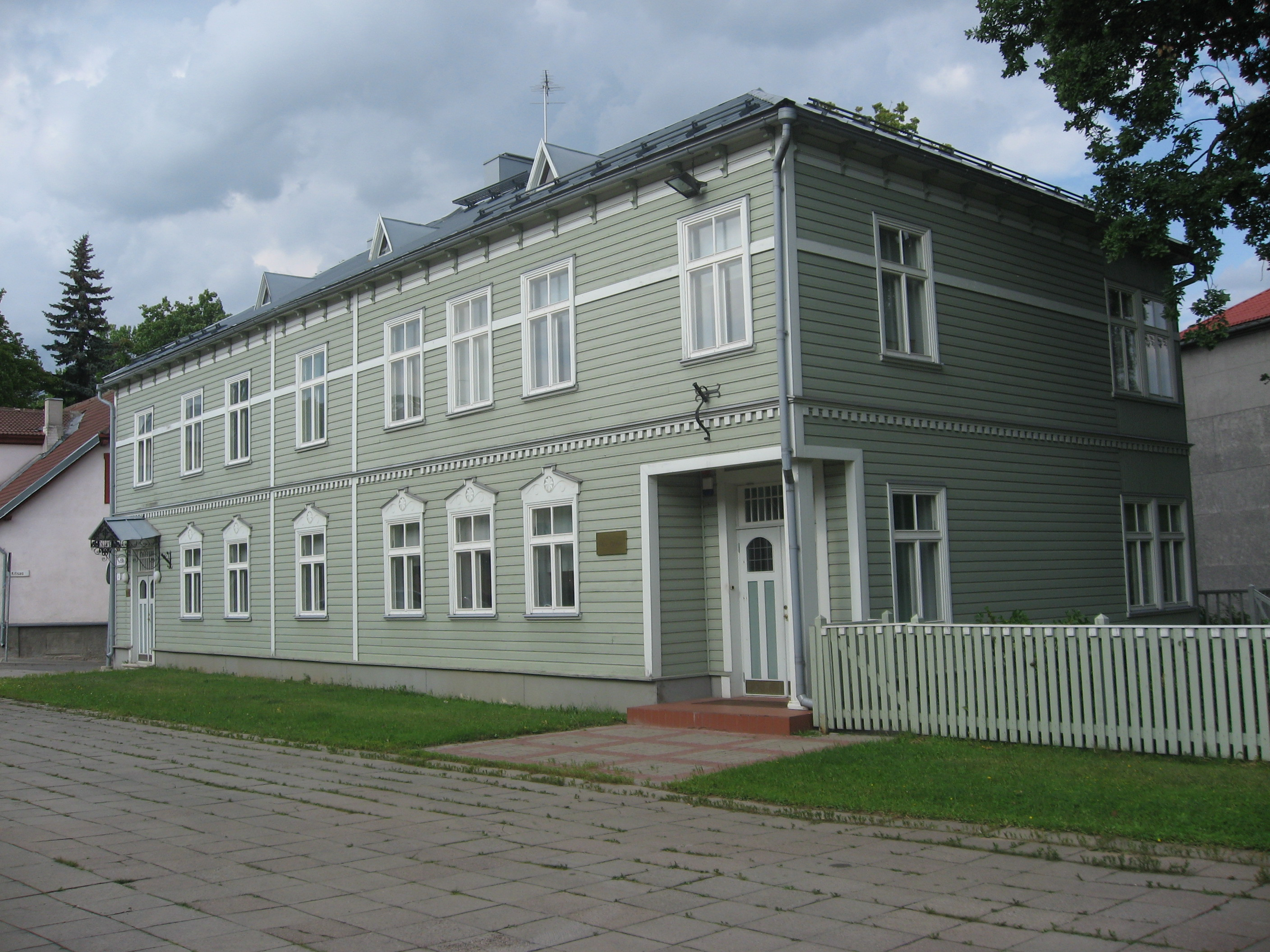 Dům v Tartu